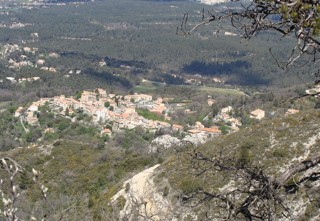 Le village de Mimet vu depuis la crète du massif de l'Étoile, entre le Grand Puech et le col Sainte-Anne.